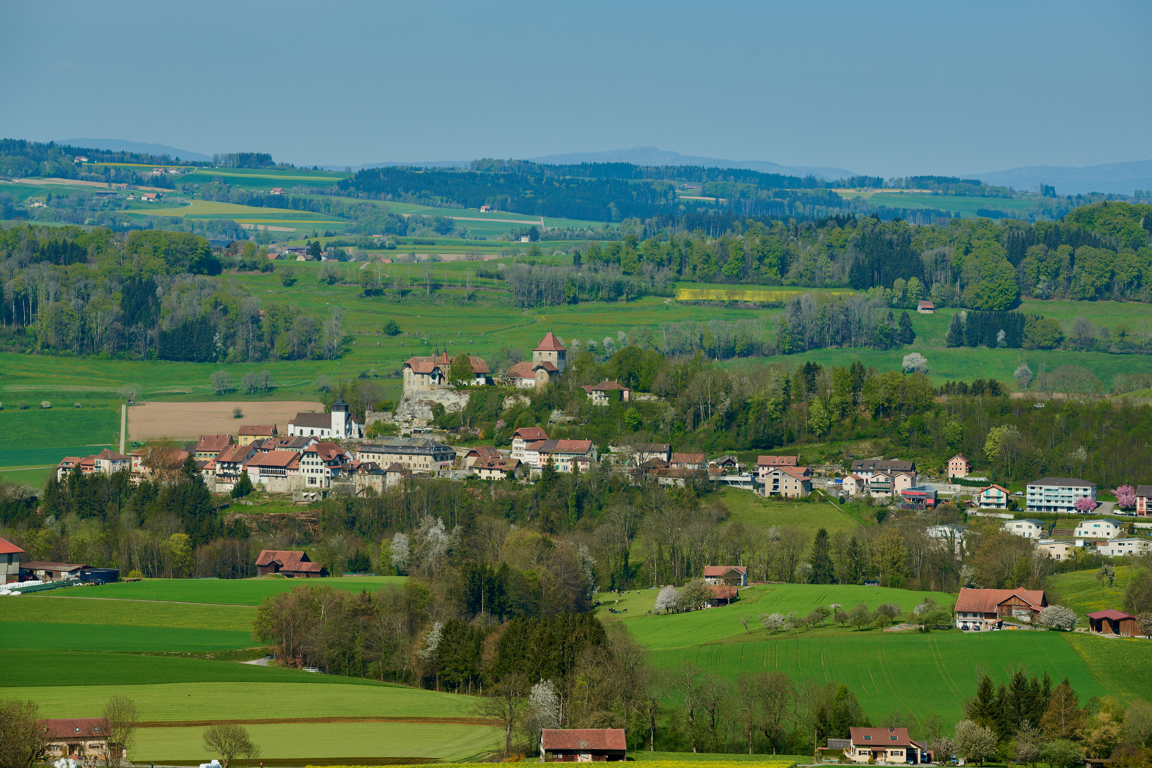 La cité médiévale de Rue dans le canton de Fribourg, district de la Glâne. Photo prise le 17.04.2020